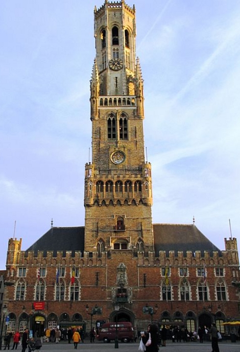 Het Belfort van Brugge - eigen foto categorie:afbeelding Brugge